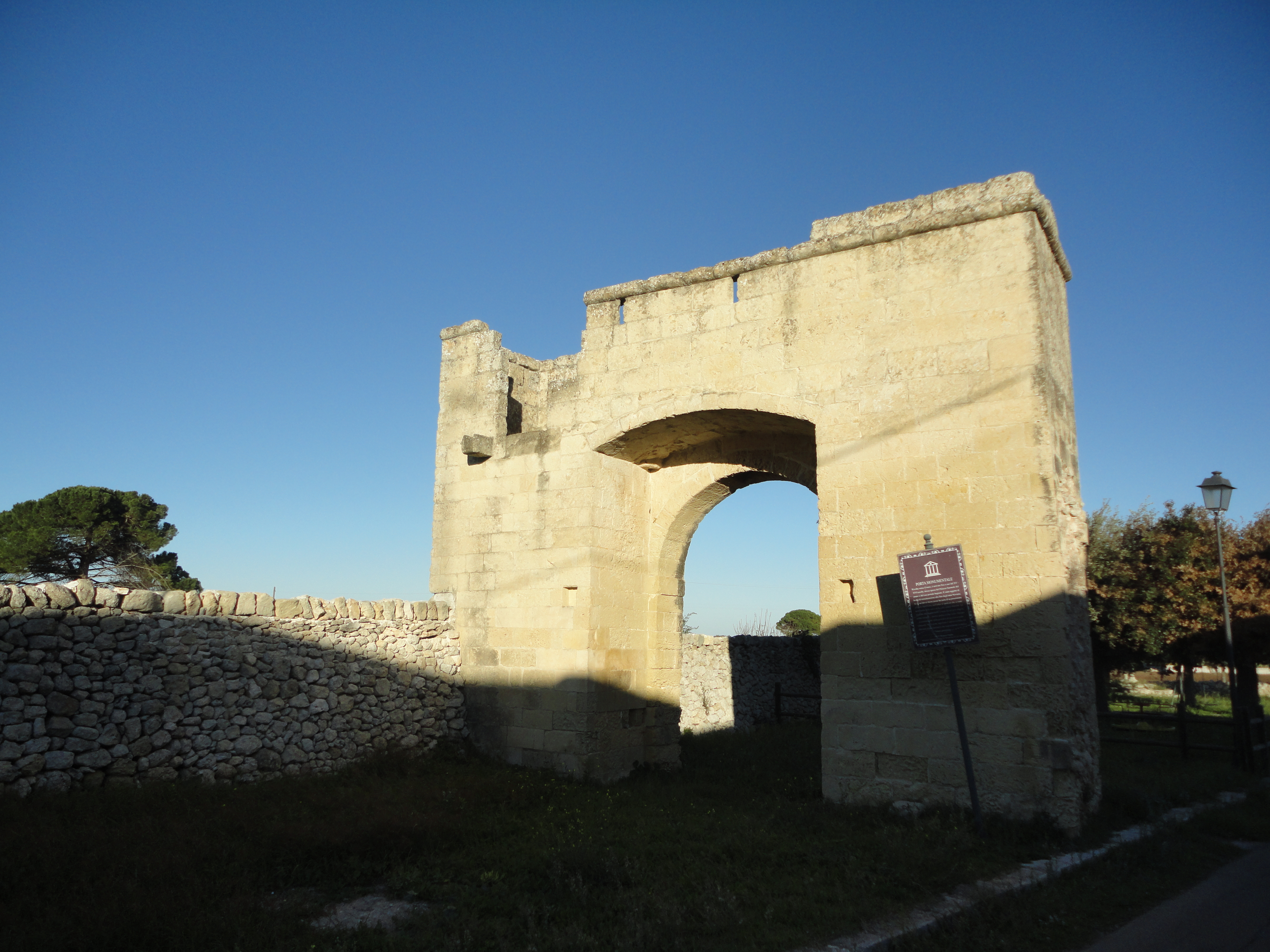 Porta Monumentale Vanze, Lecce